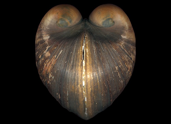 Glossus humanus (Linné, 1758)